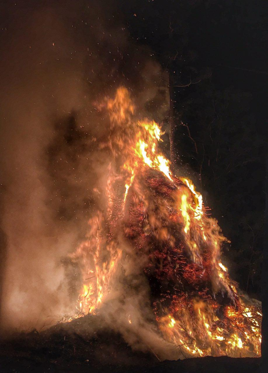 Il fuoco del calendo